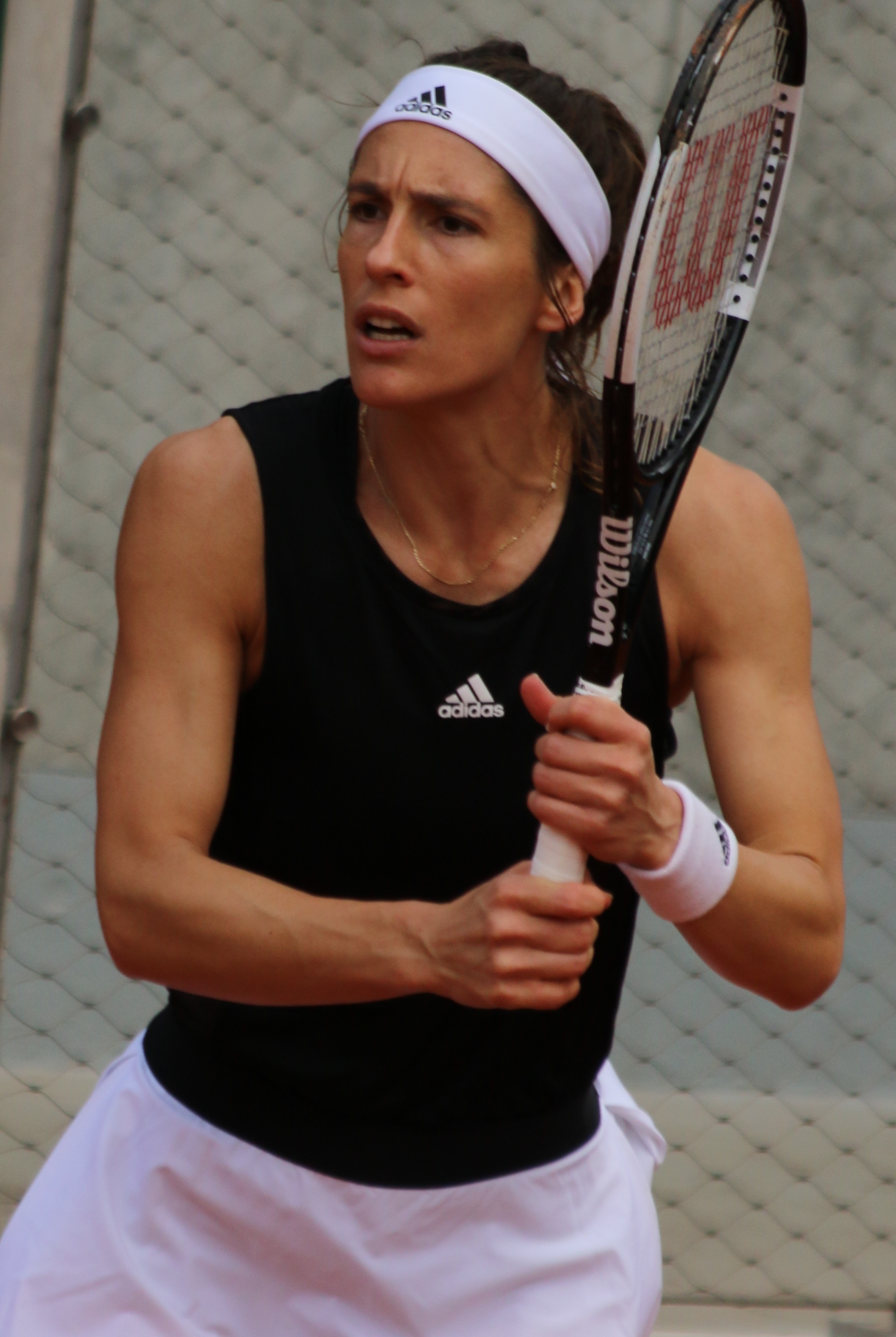 Petkovic RG19 (10)